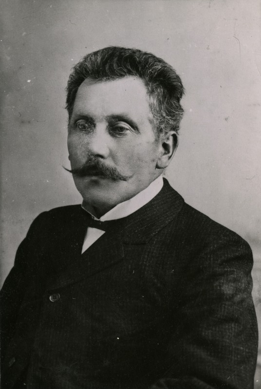 Keila esimese laenu-raamatukogu asutaja,, Alfred Rõude onu Jakob Maaberg (1861-1928) koorijuht ja seltskonnategelane. Pildistatud umbes .1900 - 1928